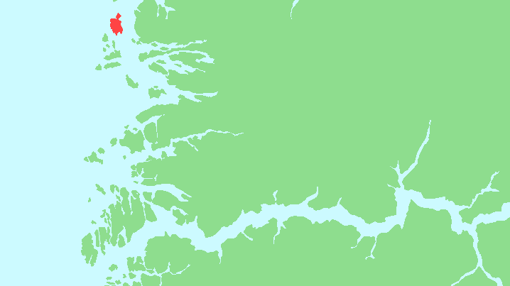 Locator map of Hovden, Sogn og Fjordane, Norway